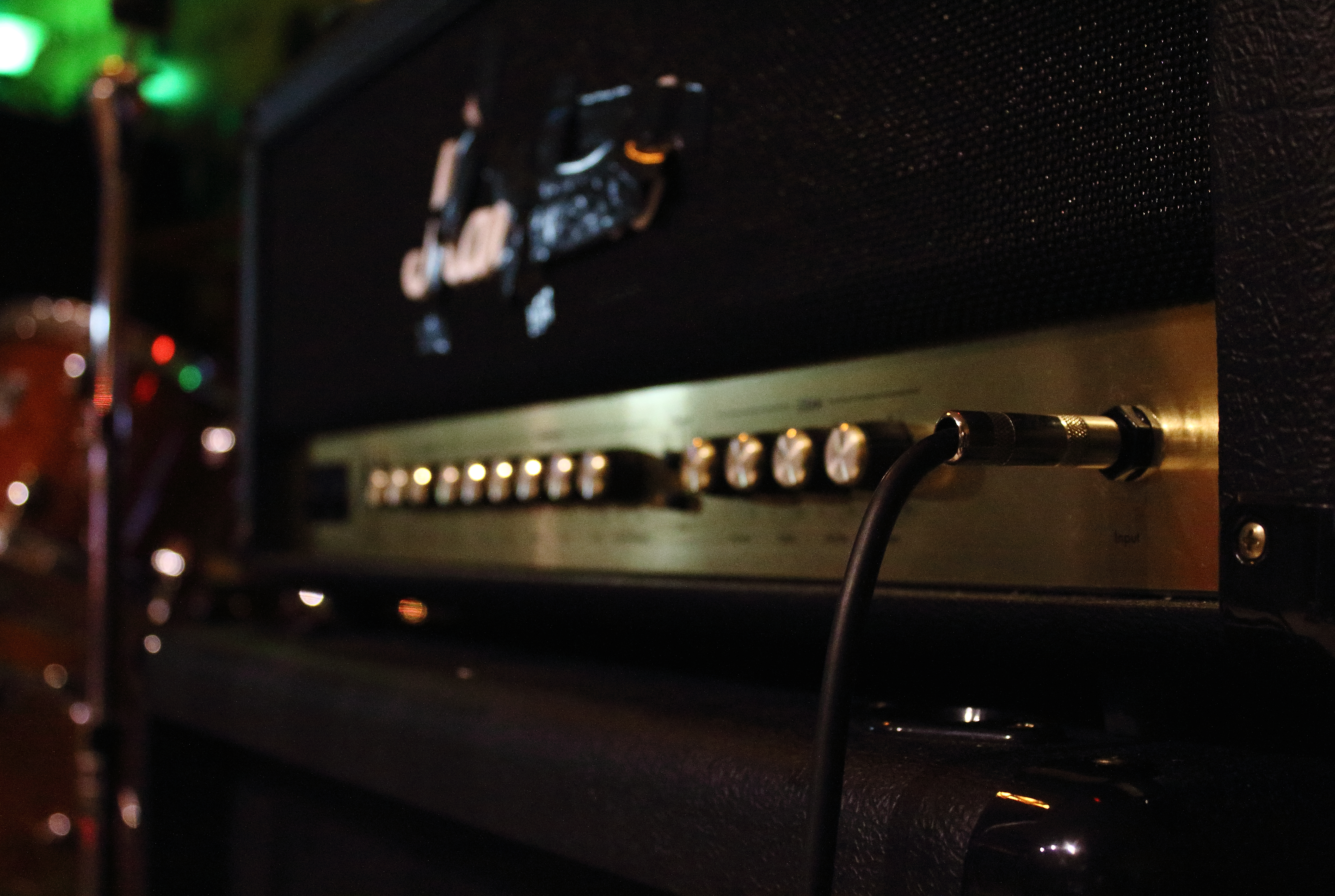 Amplificador para guitarras eléctricas.